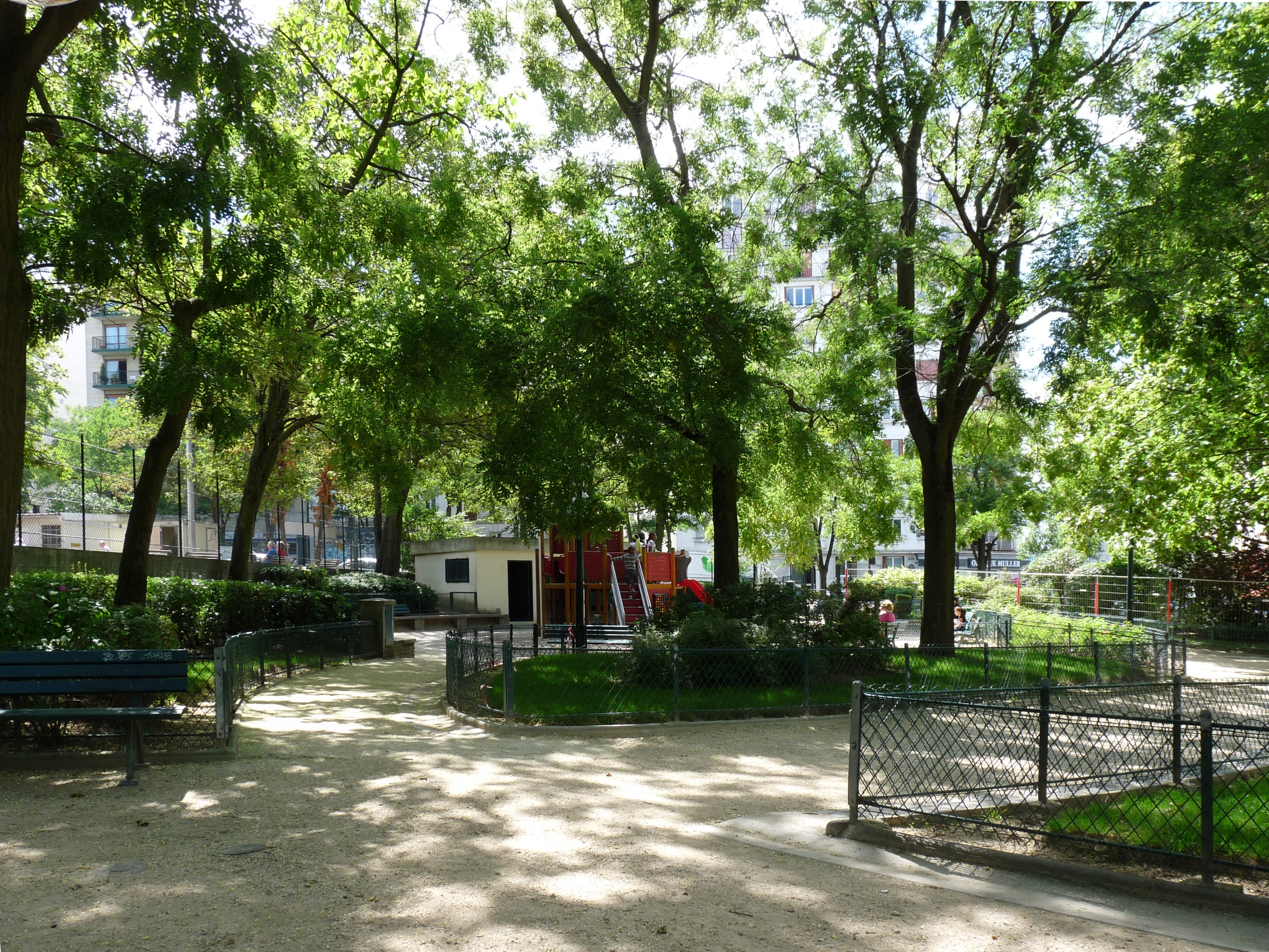 Le square Belleville - Télégraphe à Paris